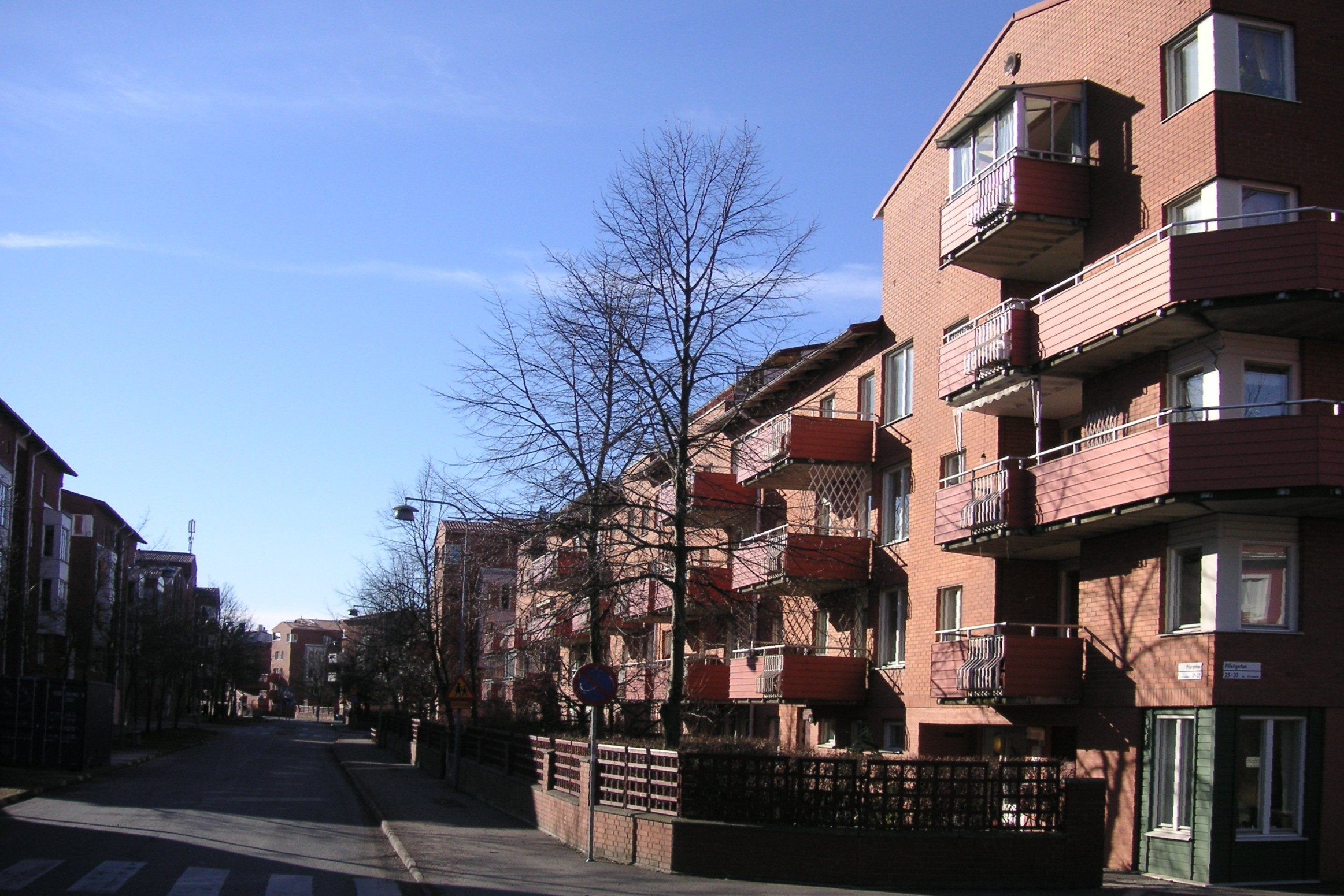 Pilotgatan, Skarpnäcks gård i Stockholm